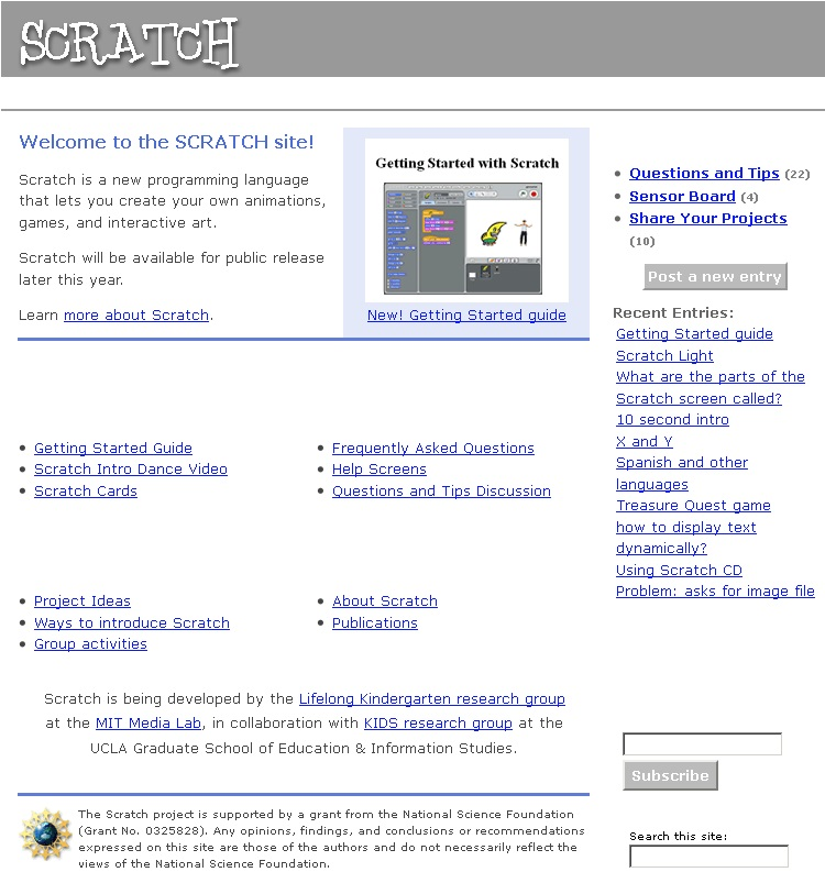 Първата уеб-базирана версия на Скрач, пусната 2005 г.